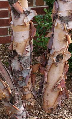 River Birch.